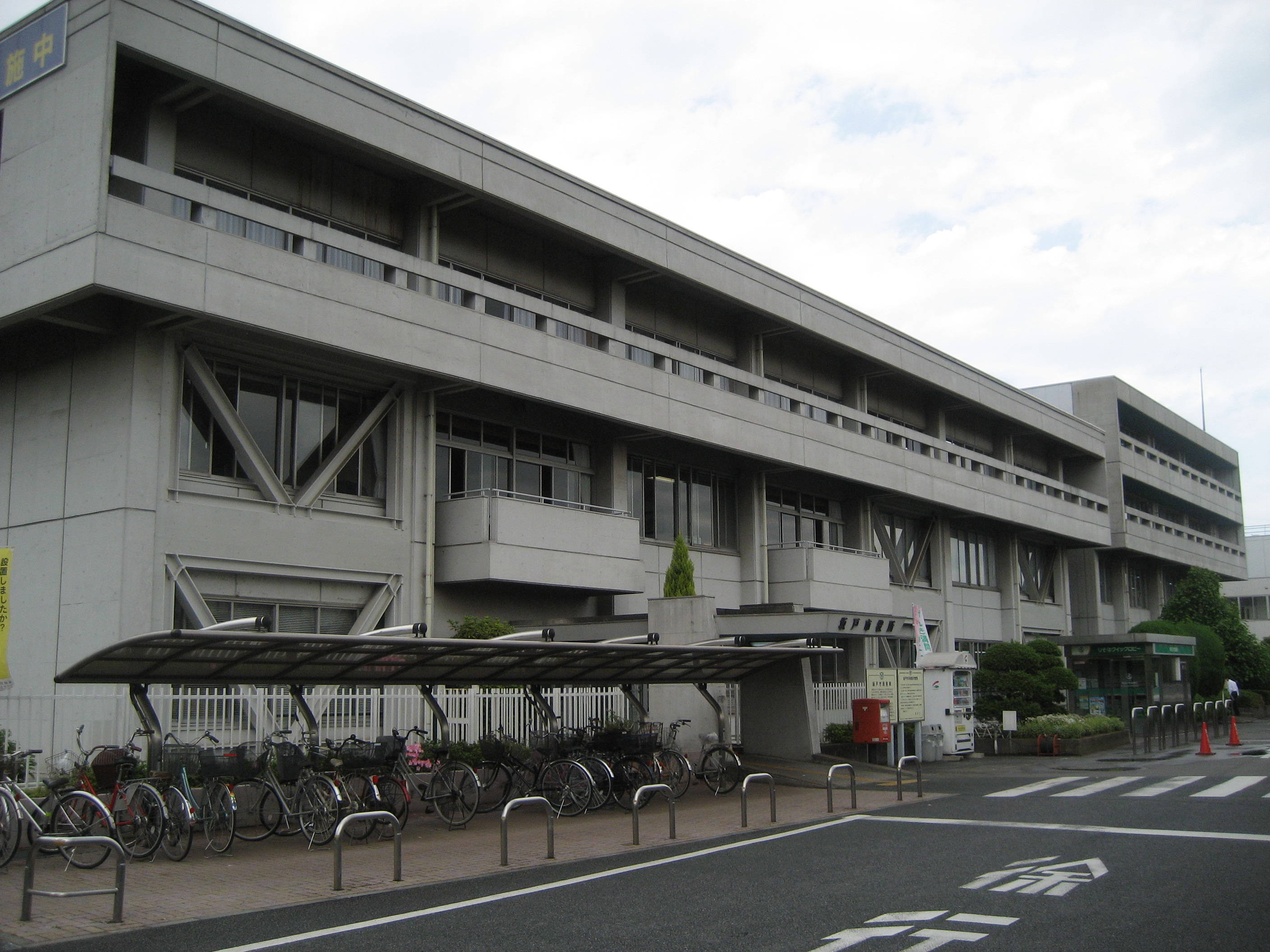 坂戸市役所庁舎